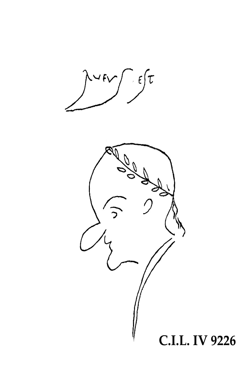 Inscripción pompeyana